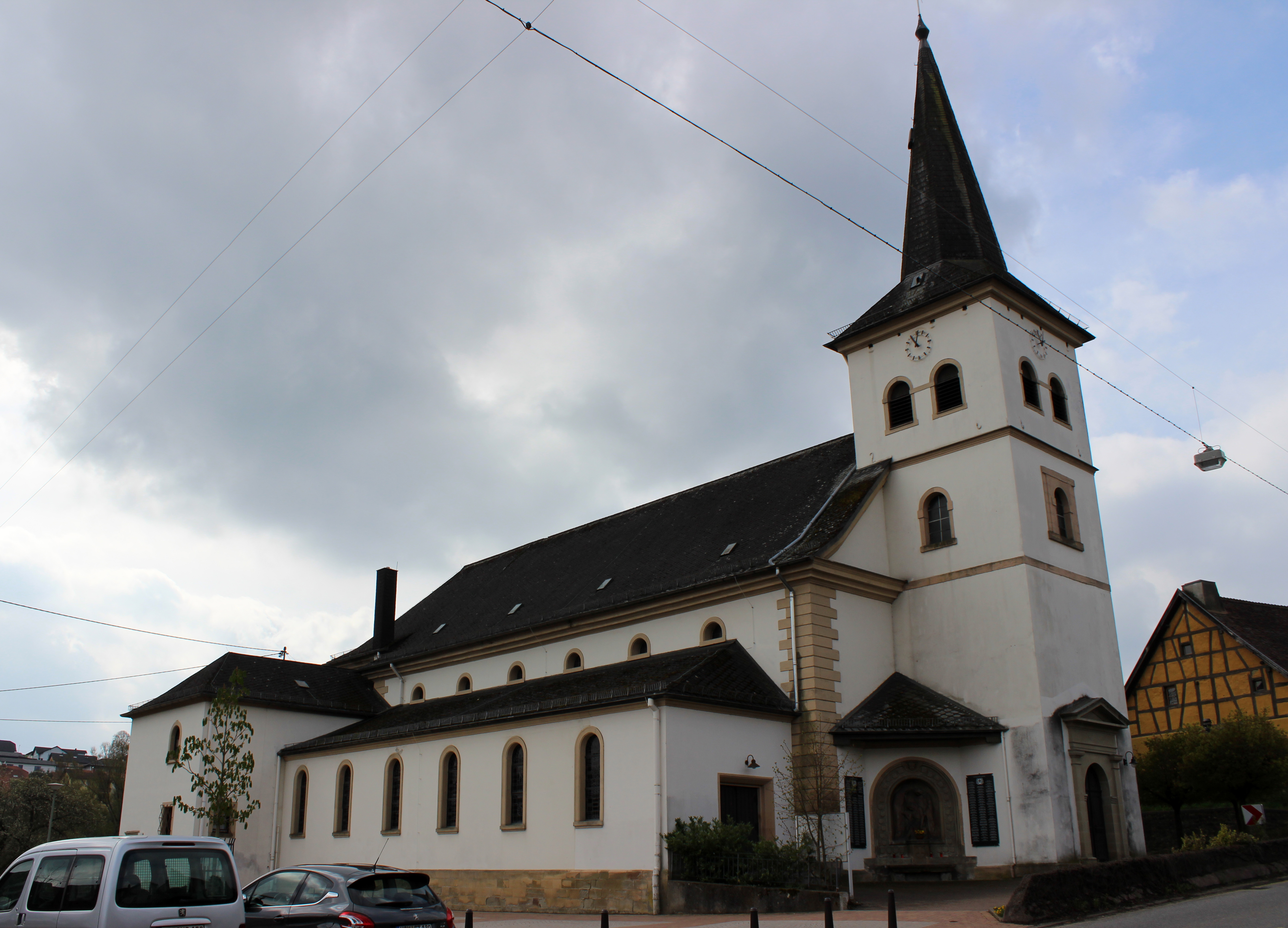 Die katholische Pfarrkirche St. Mauritius in Alsweiler, einem Ortsteil der Gemeinde Marpingen, Landkreis St. Wendel, Saarland